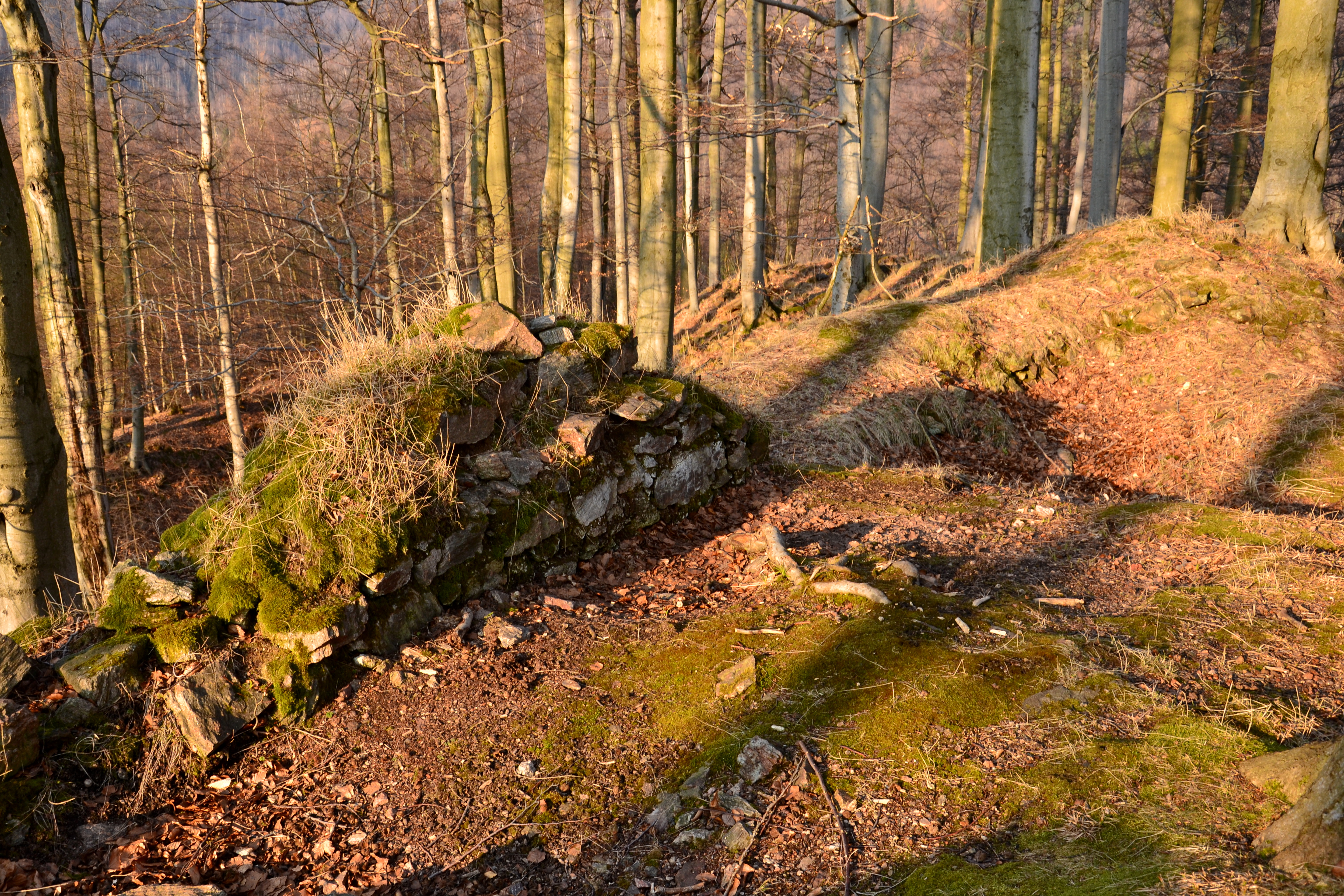 Fragment palácové zdi